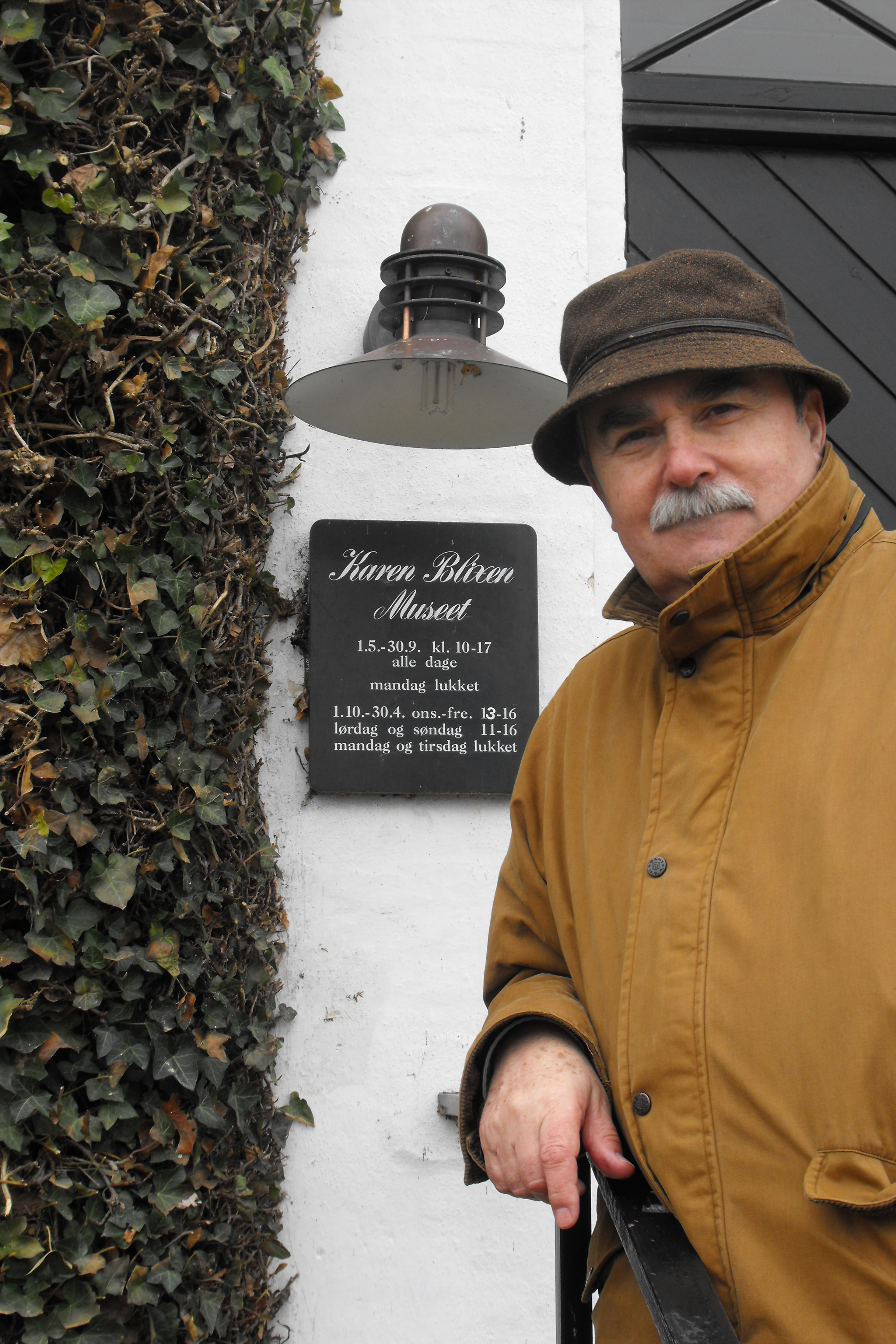 Przed domem Karen Blixen. 2015